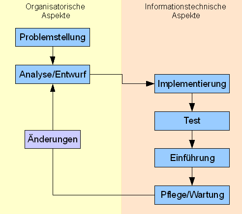 Softwarelebenszyklus